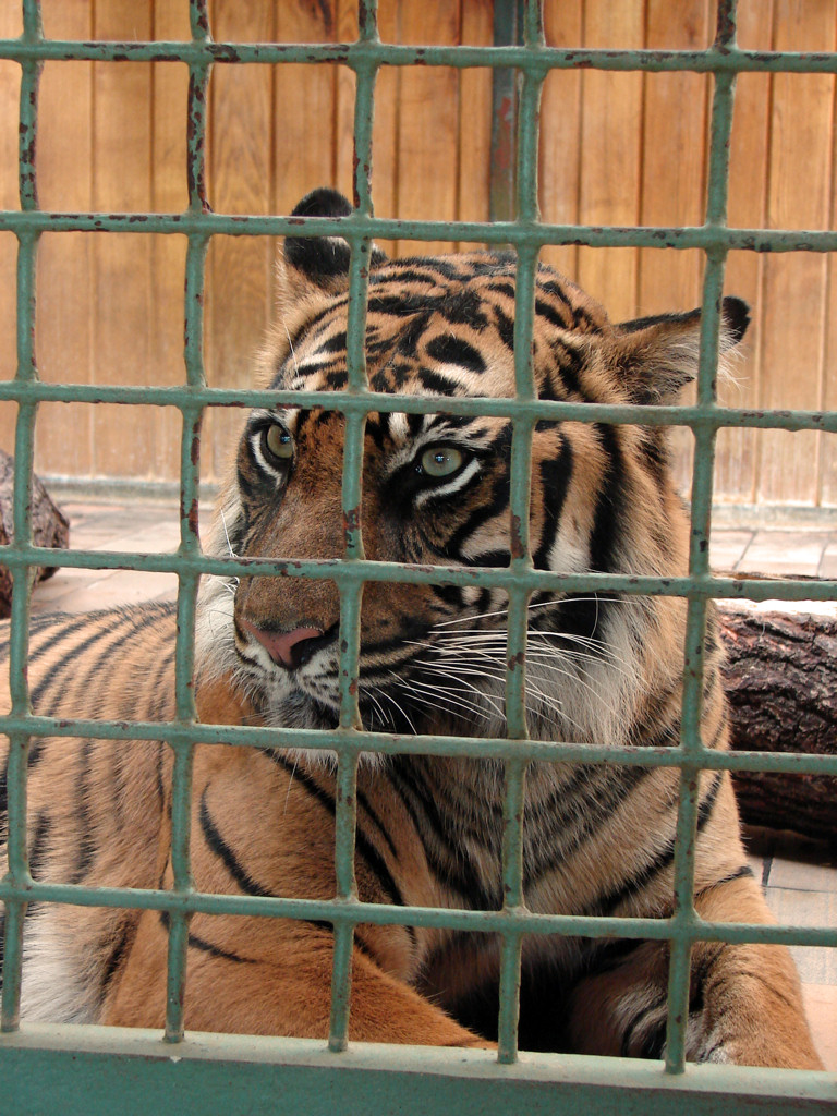 Tierpark Mai 2008